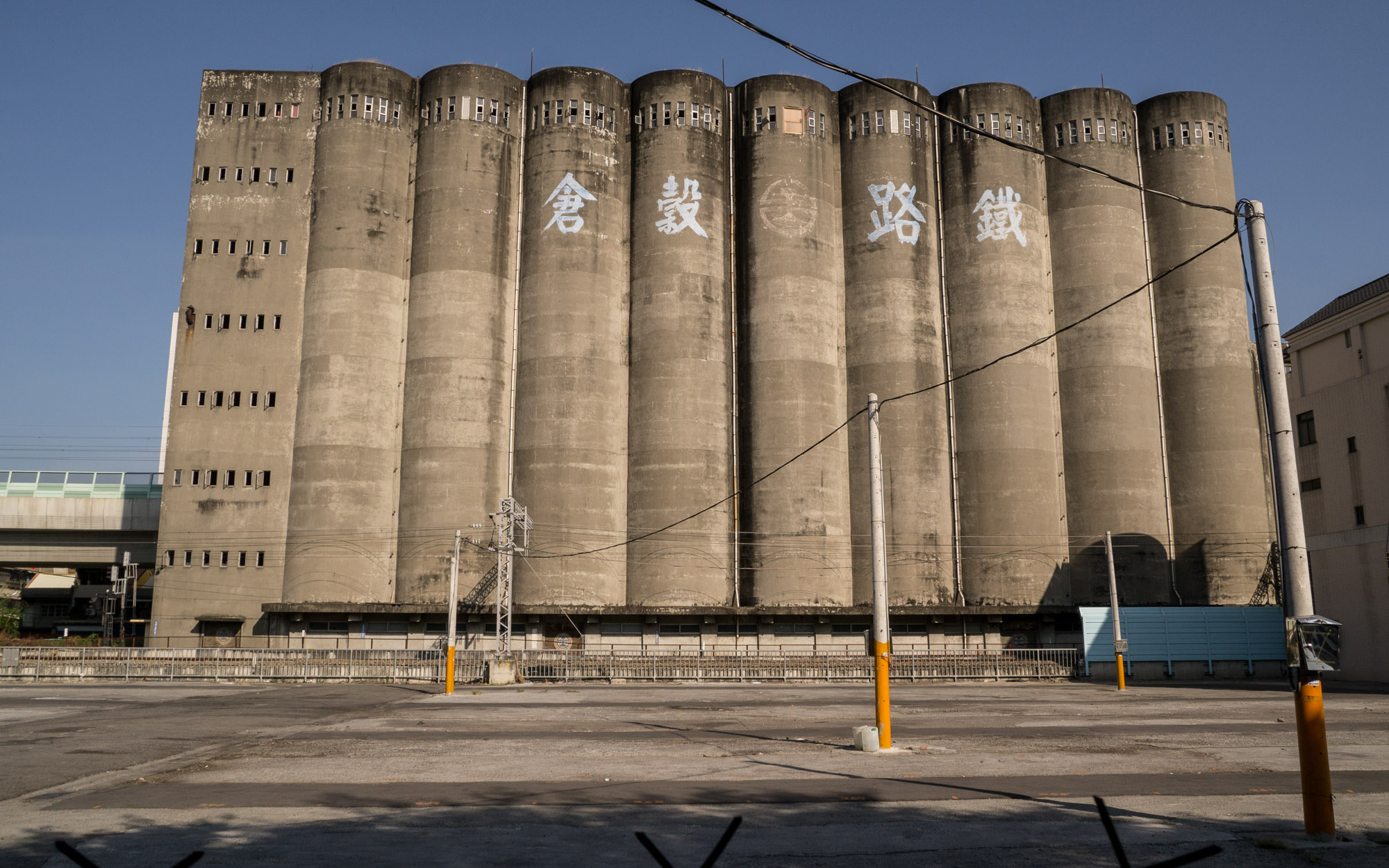 臺灣鐵路管理局員林鐵路穀倉。